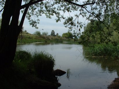 Río Bullaque. Tabla en la Junta de los Ríos (El Robledo).